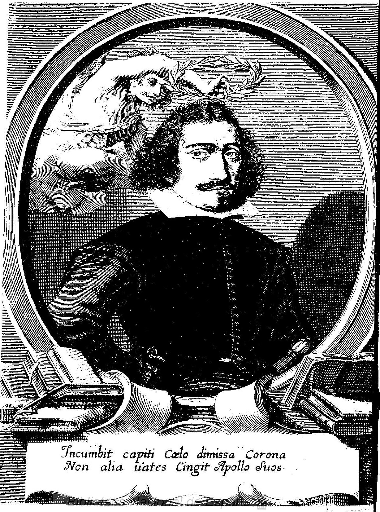 Retrato de Antonio Enríquez Gómez, ilustración de "Academias morales de la musas", estampada en Burdeos por Pedro de la Court en 1642. Firma en la repisa, a la izquierda, "ML [enlazadas] fe."